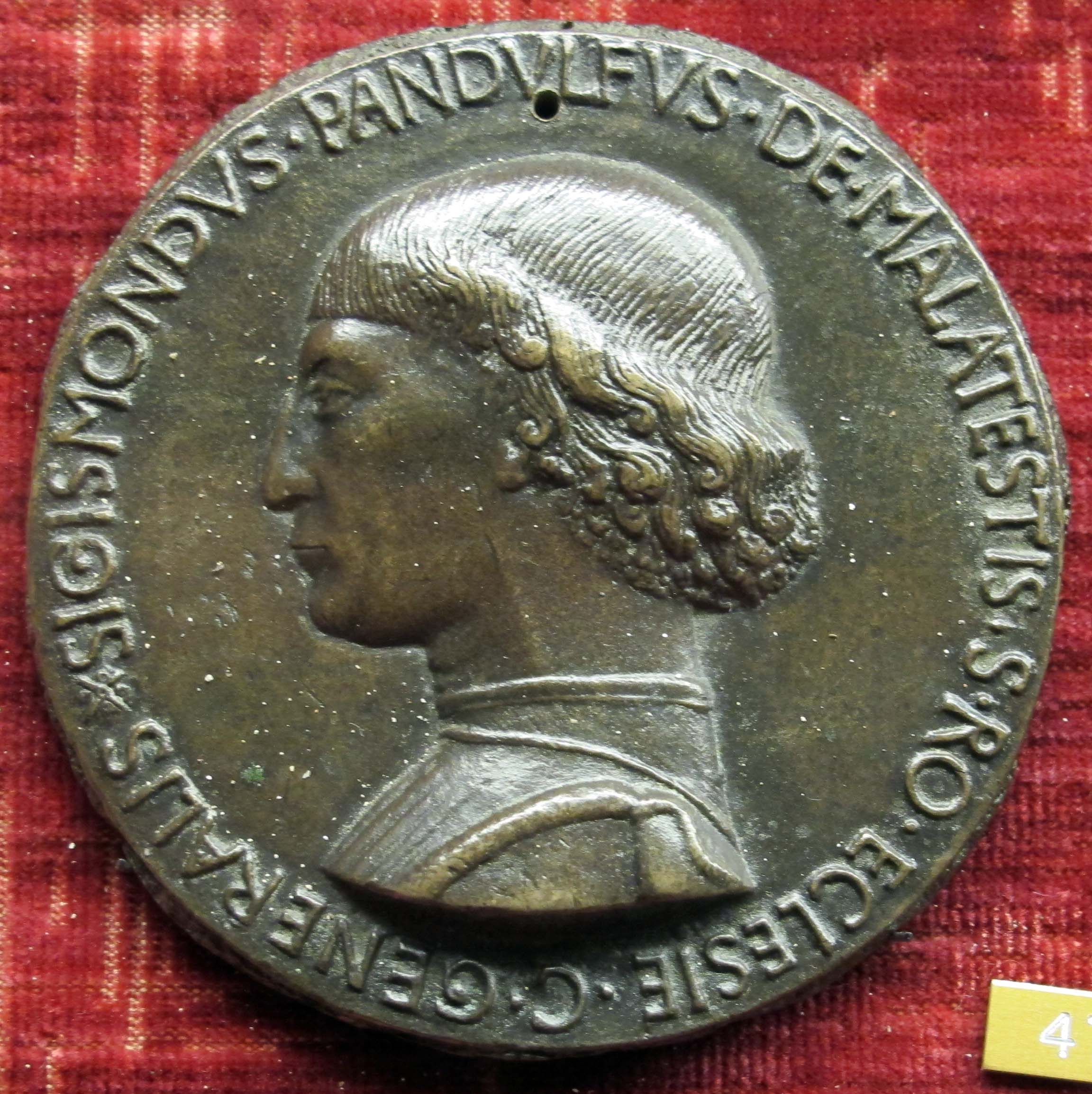 Matteo de' pasti, medaglia di sigismondo pandolfo malatesta con castel sismondo, recto, versione della rosetta 1446